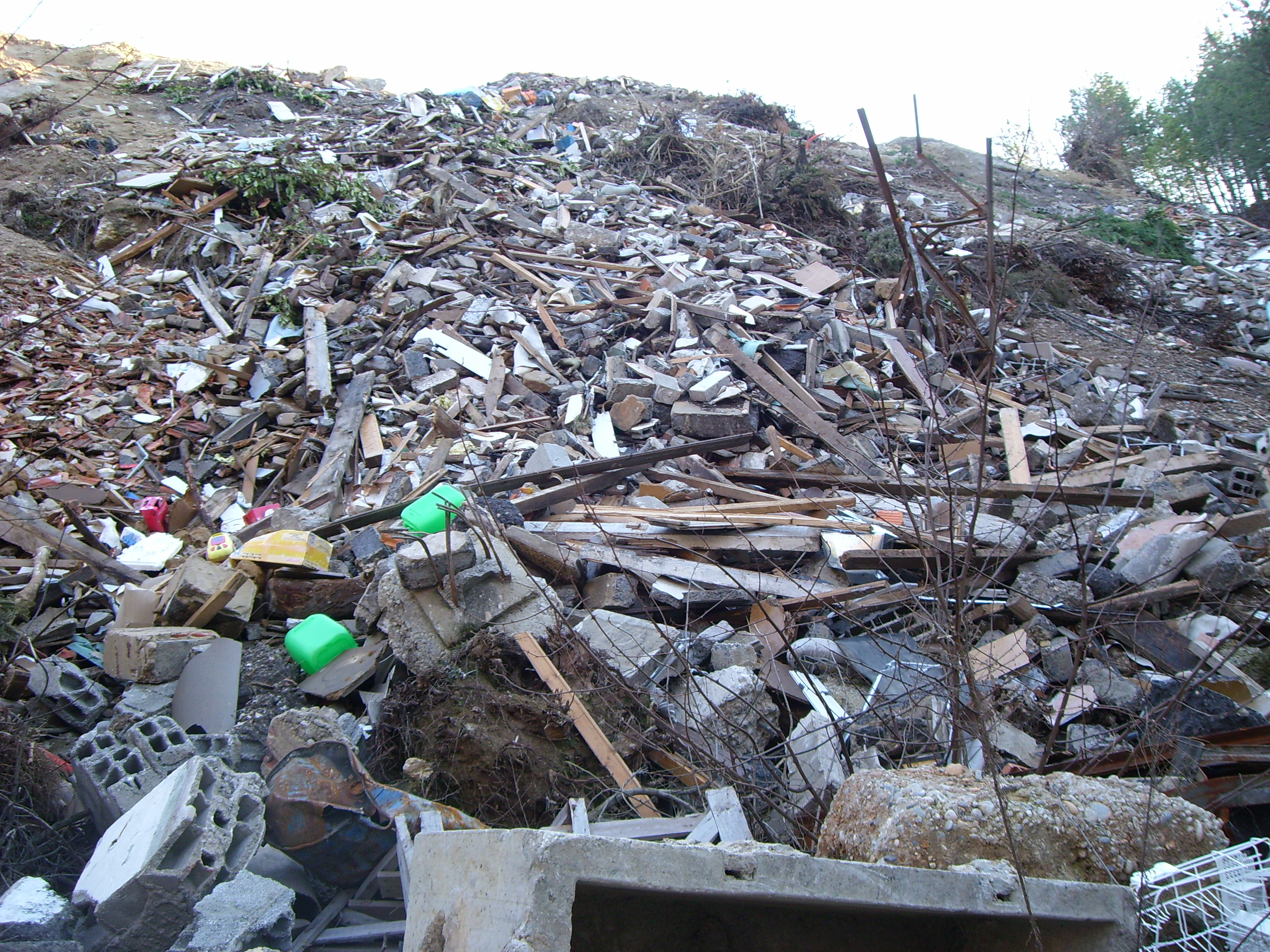 Décharge sauvage au nord de Montvendre (Drôme, France).